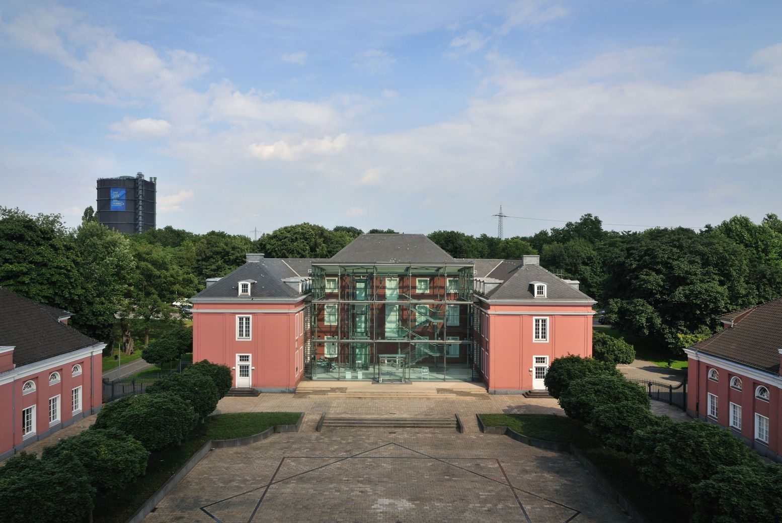 Hauptgebäude des Schlosses Oberhausen mit der Ludwig Galerie